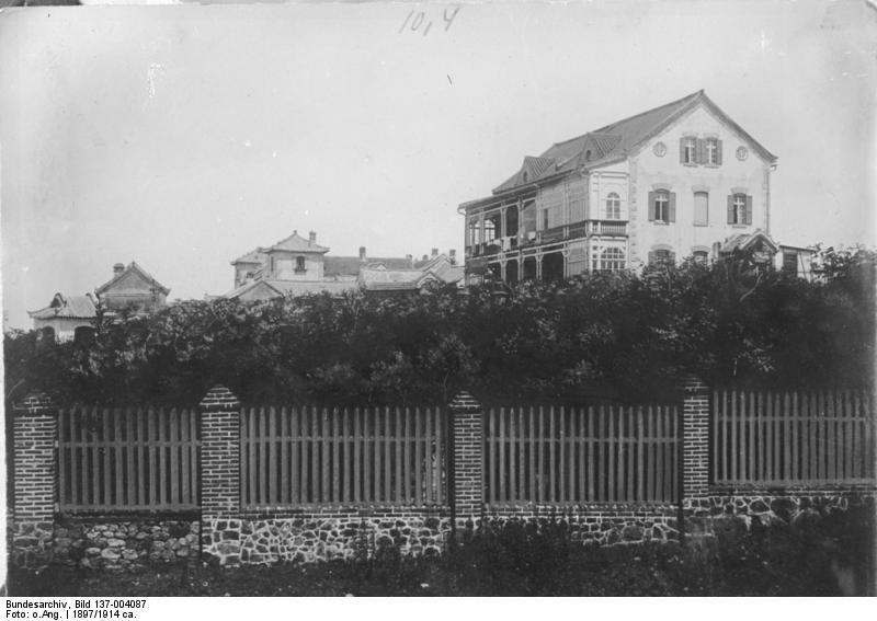 China, Tsingtau, Evangelischen Mission China, Tsingtau Gebäude der evangelischen Mission in Tsingtau.